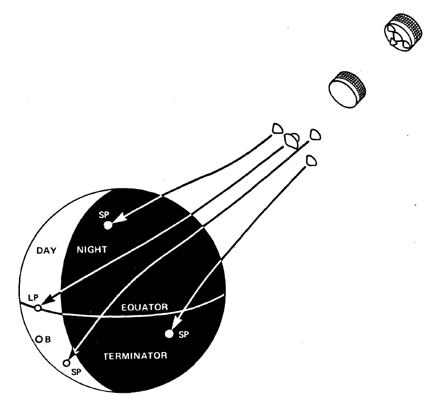 Entry-points-for-Pioneer-Venus-Atmosphere-probes